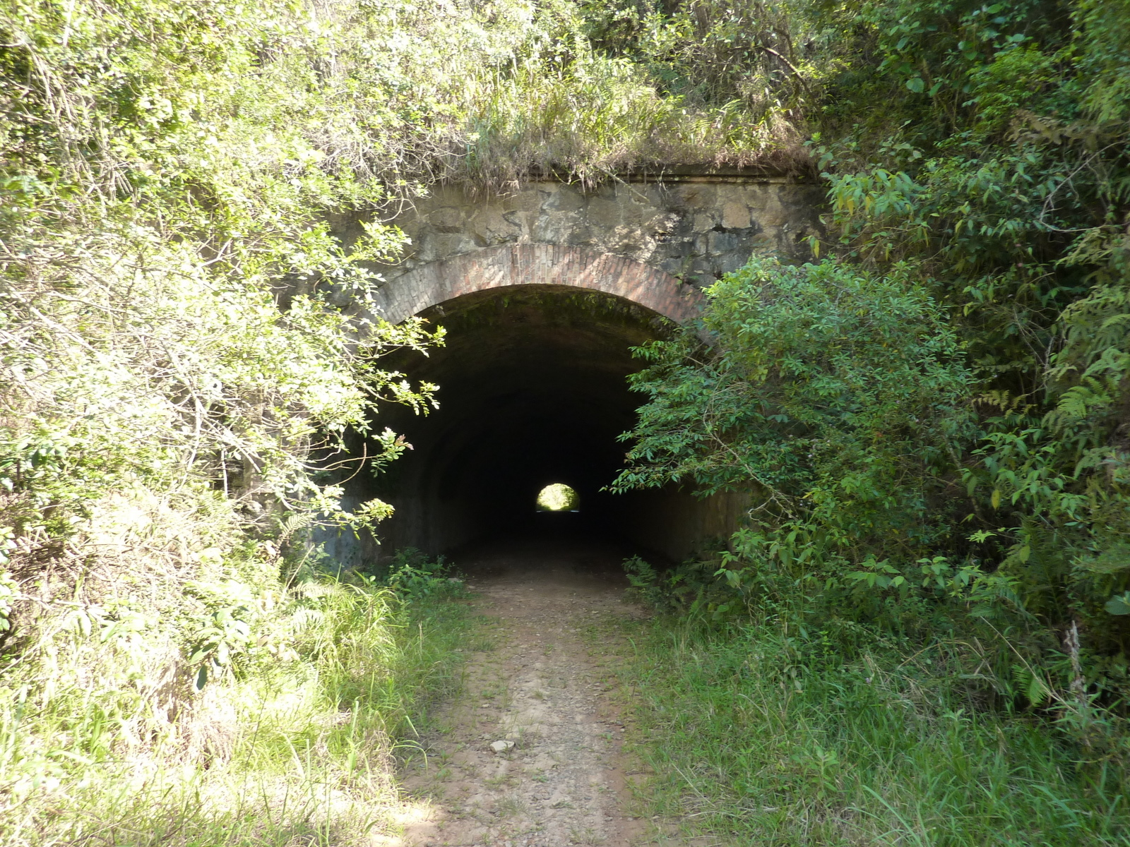 Antigo túnel da Estrada de Ferro Sorocabana - EFS (Itu-Mairinque) próximo à Estação Moreiras em Mairinque